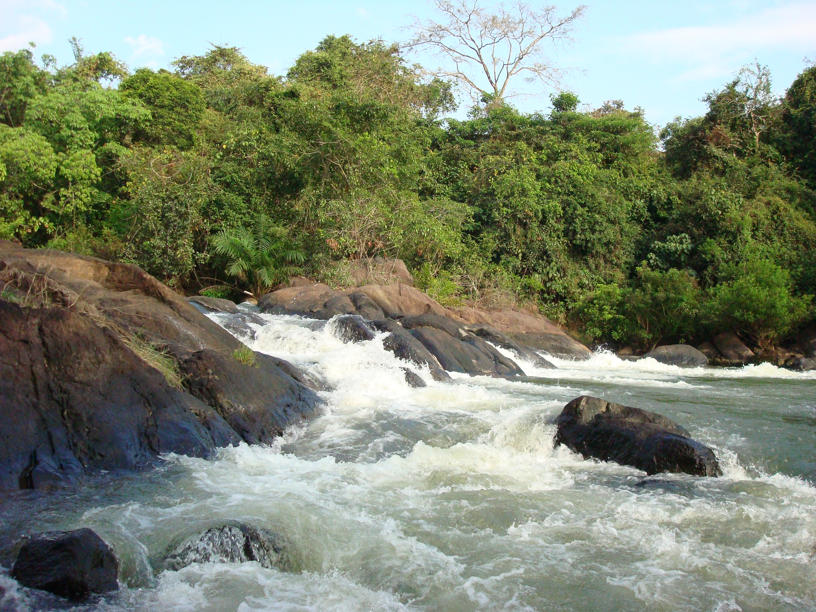 Kallada River laughs at Kakod on way to Punalur